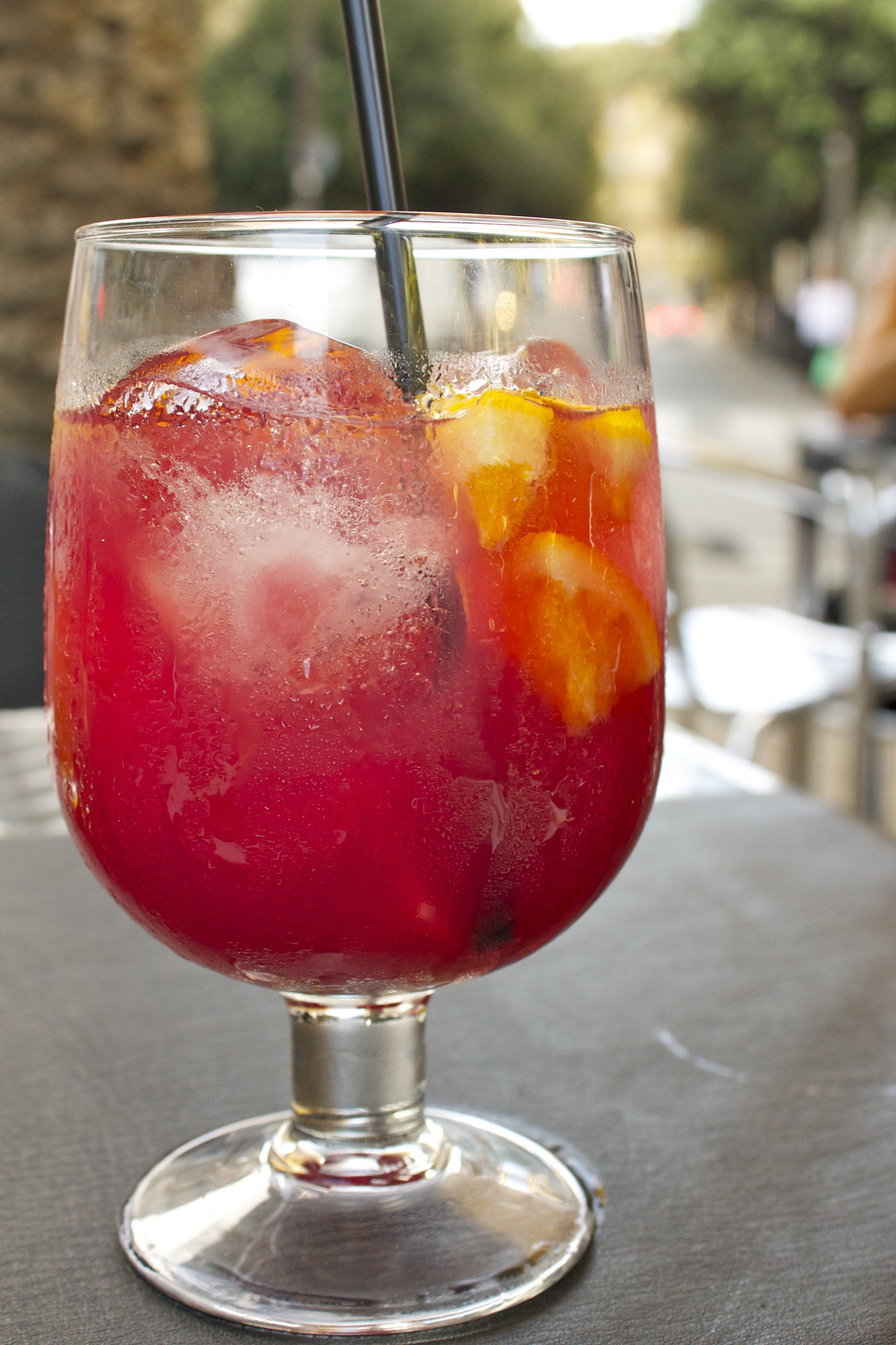 Una jarra de sangría en El Raval, Barcelona.